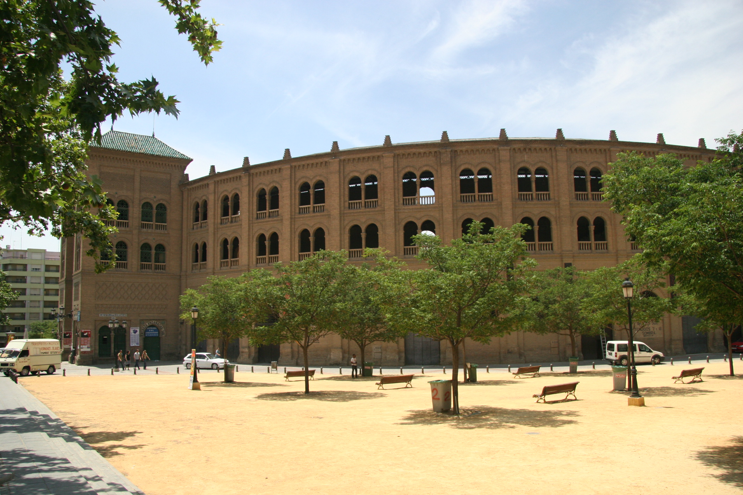 Plaza de toros de la Real Maestranza de Caballerías de Granada